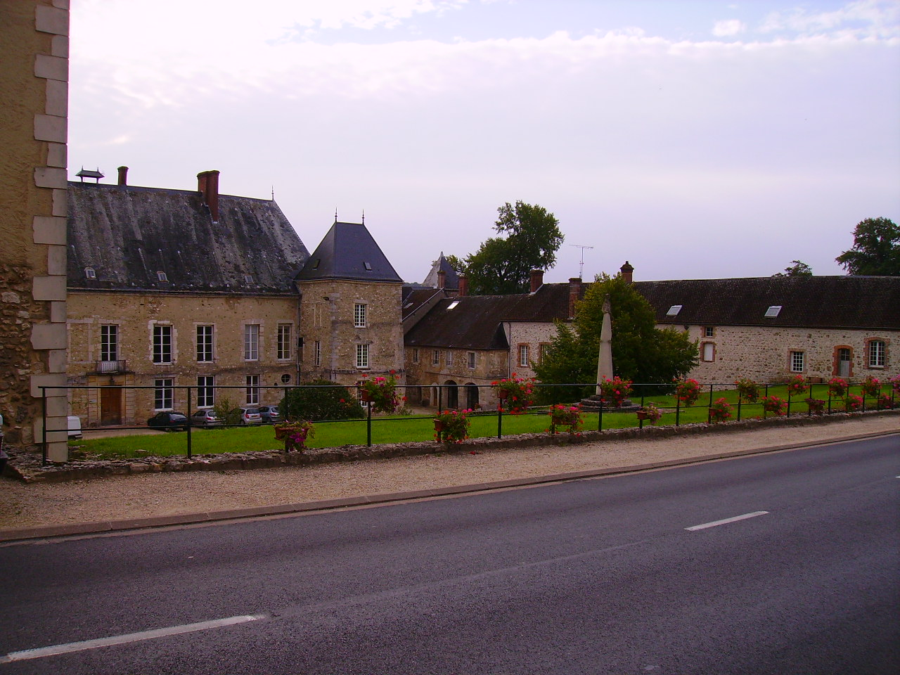 chateau de Baye (Marne(51), France)